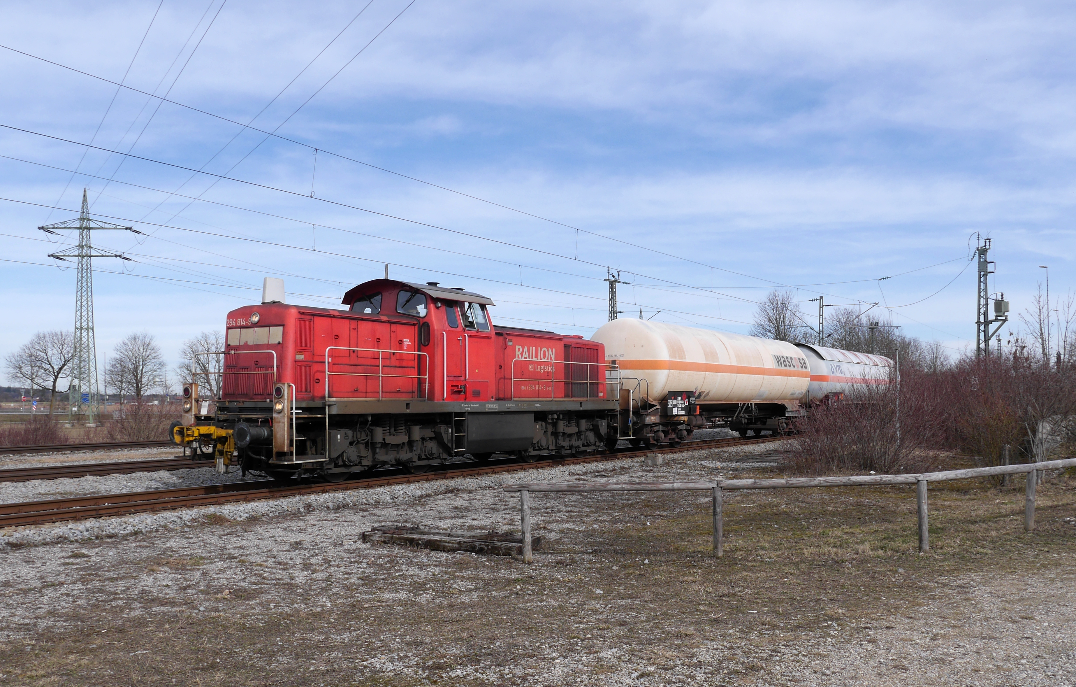 294 814 der DB Cargo mit zwei Kesselwagen zum Flüssiggaslager Krailling im Bahnhof München-Freiham, rechts die ehemalige Laderampe